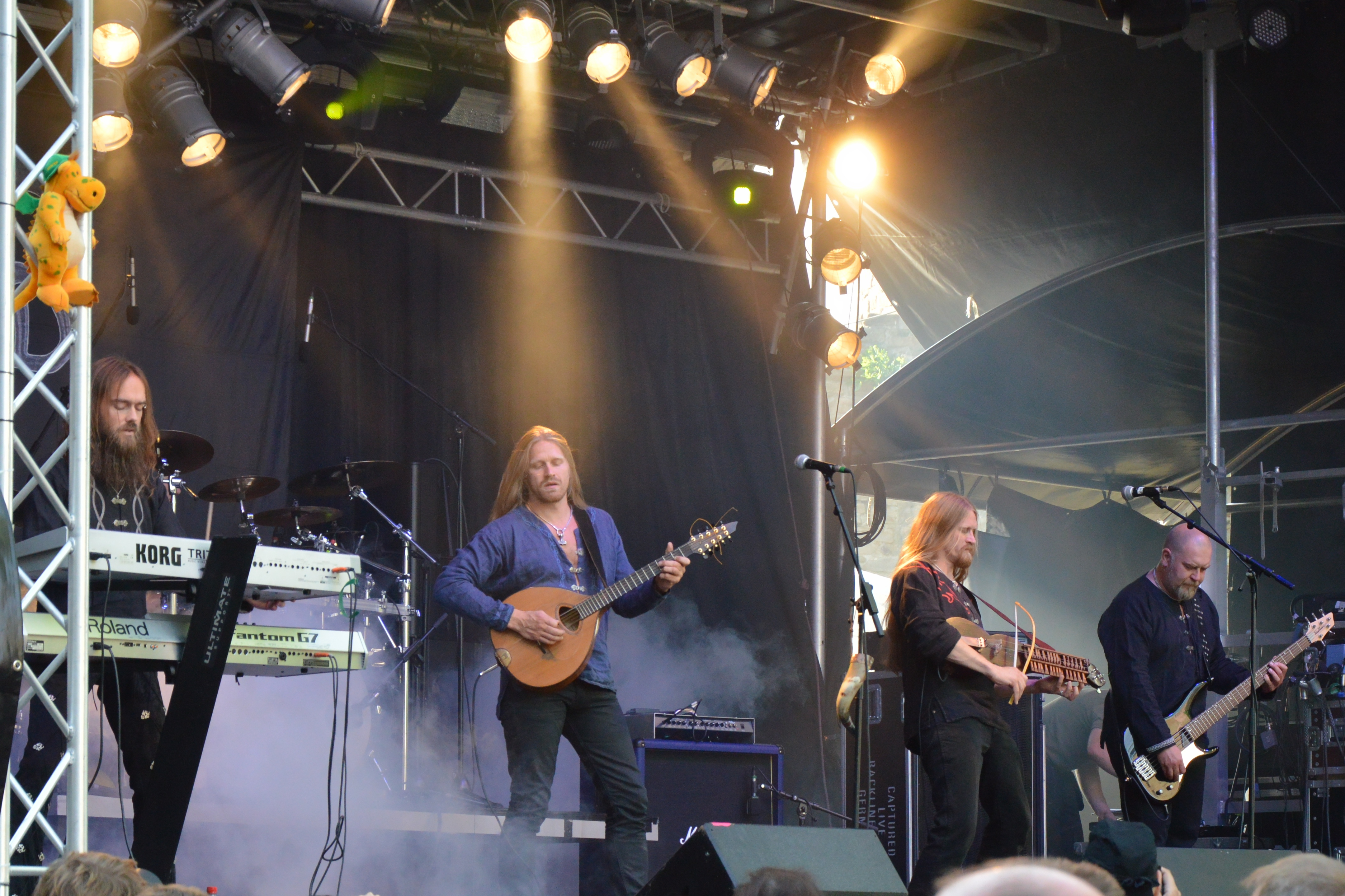 Fejd beim Burgfolk Festival 2013 auf Schloß Broich